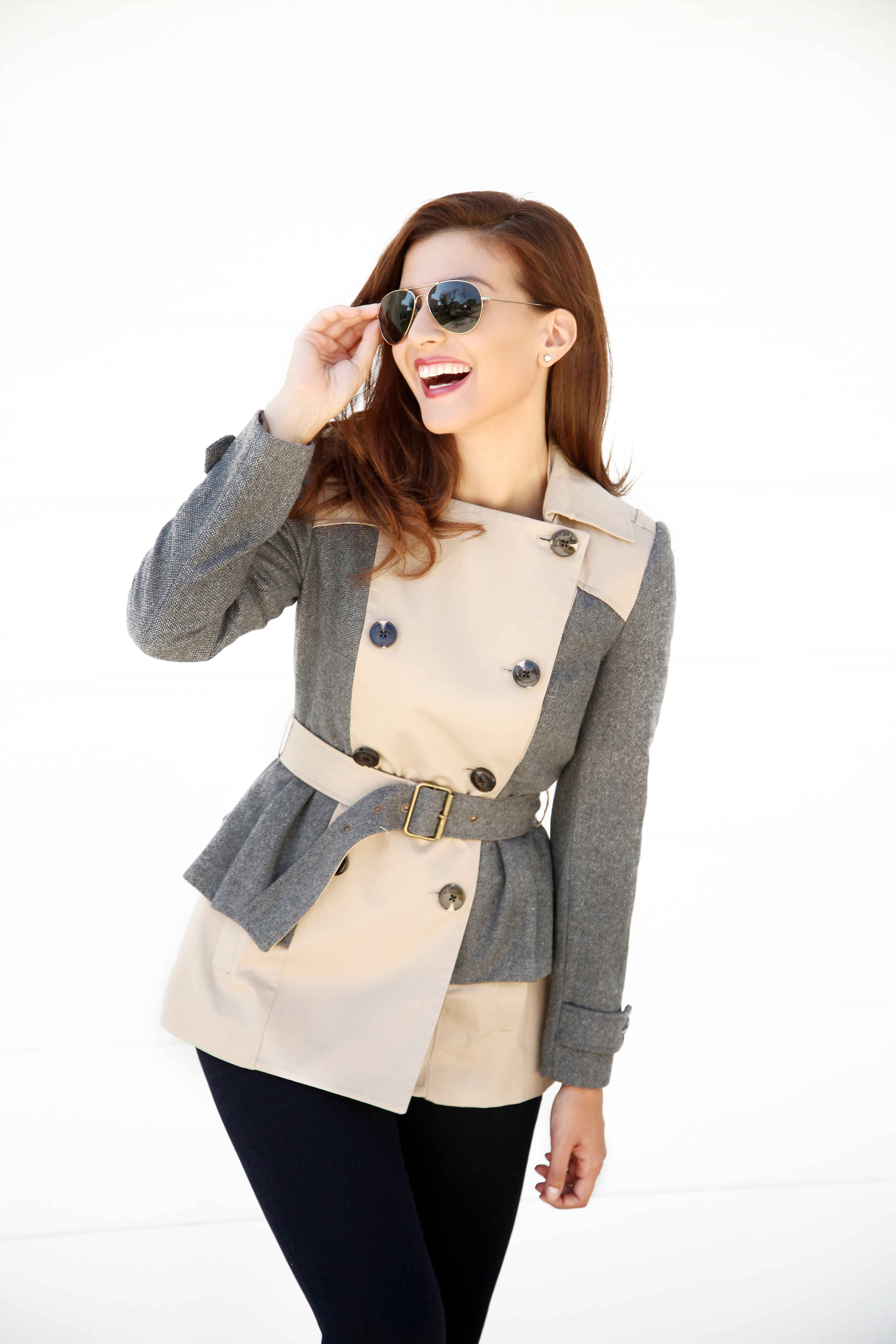 Cortefiel